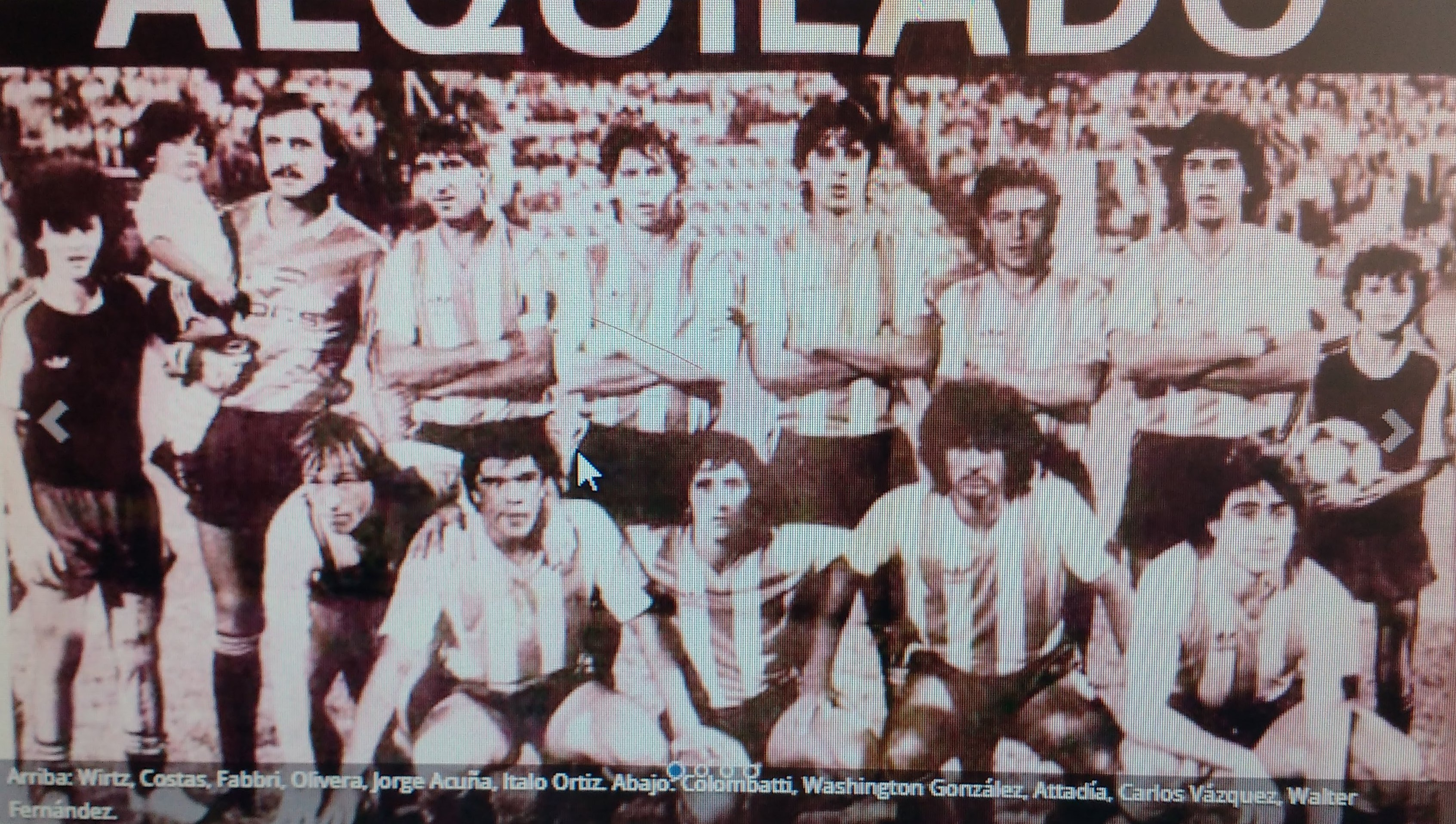 Argentino - Racing Equipo